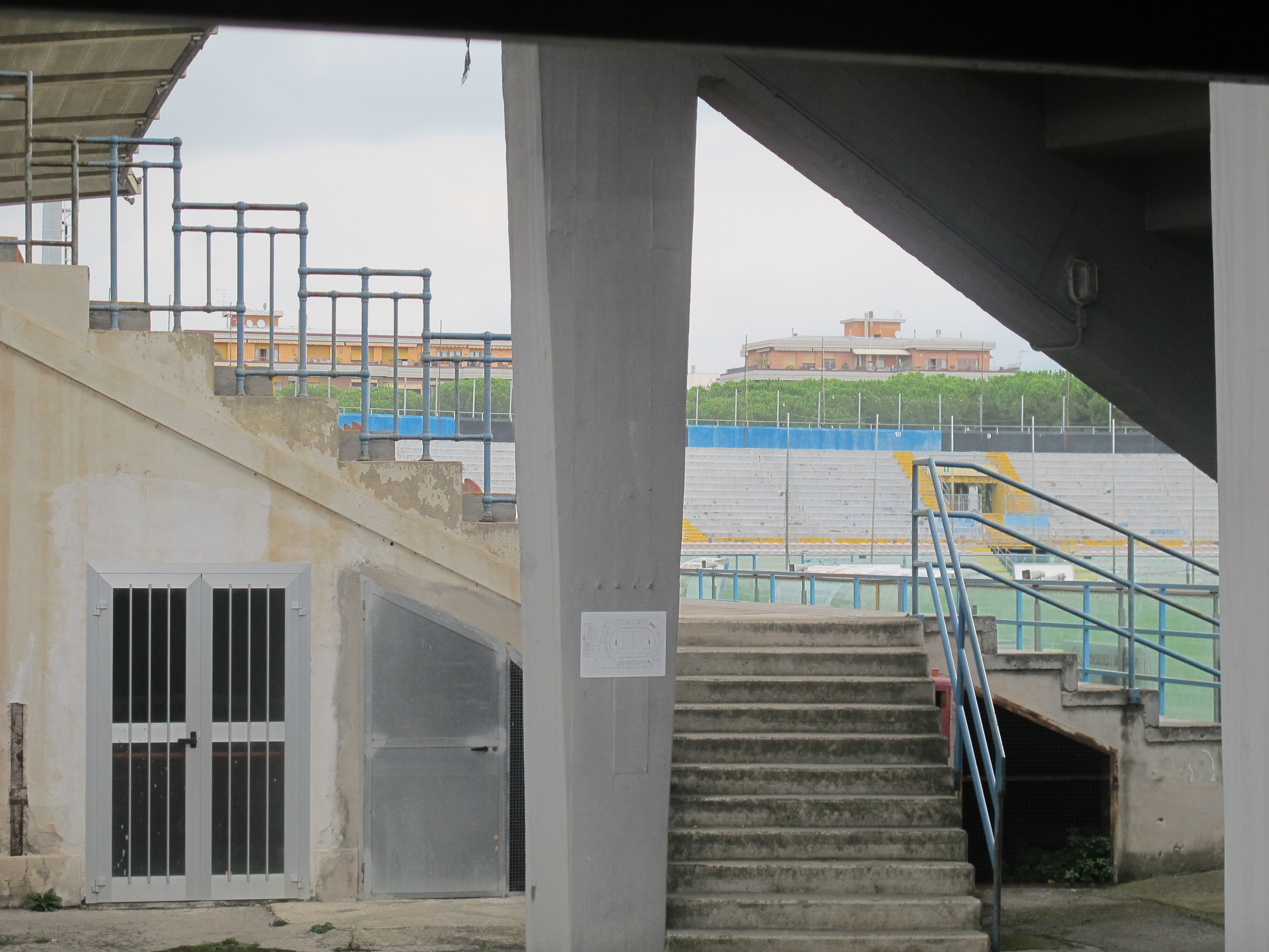 Lo stadio di Pisa. Visuale tra la tribuna coperta e la curva sud ospiti.